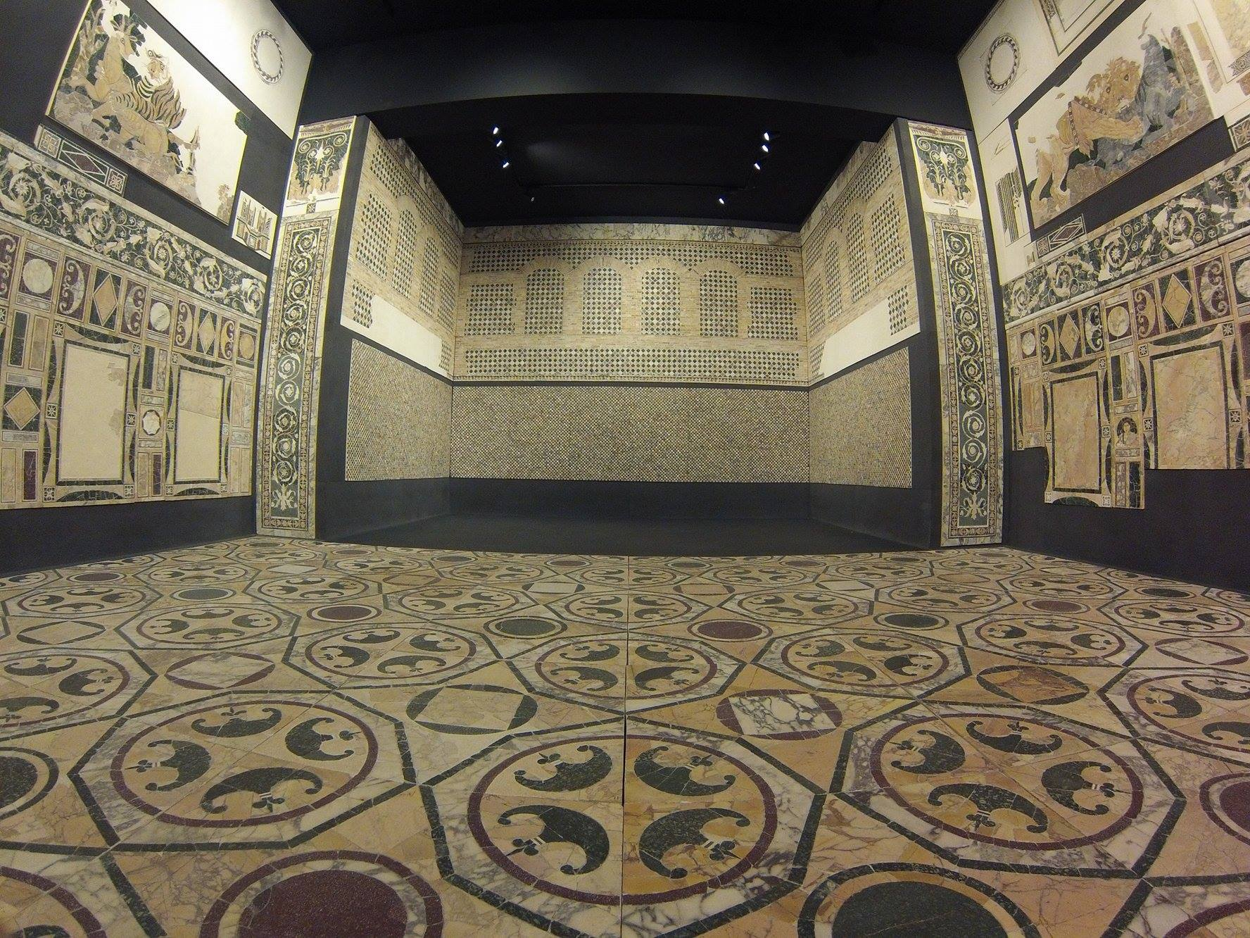 wonderful mosaic MaMe